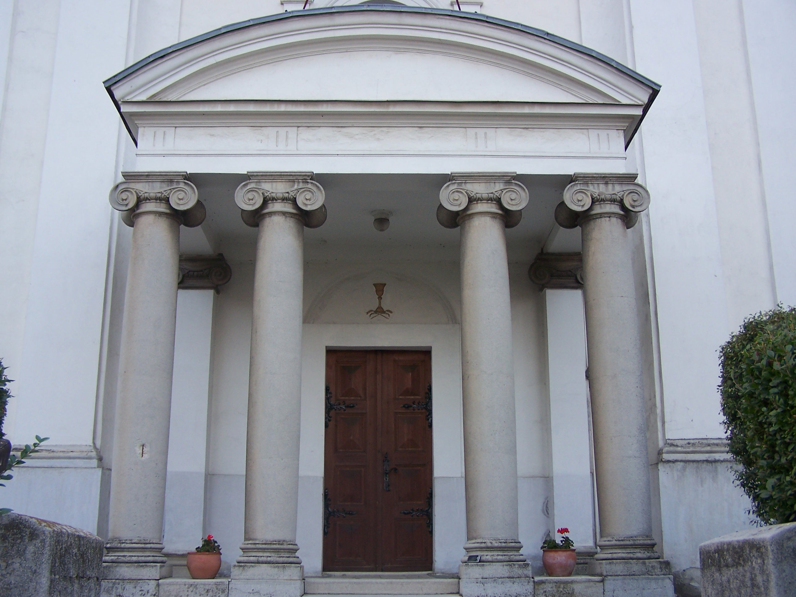 Református templom (Gyömrő, Gróf Teleki utca 85.) This is a photo of a monument in Hungary. Identifier: 7067